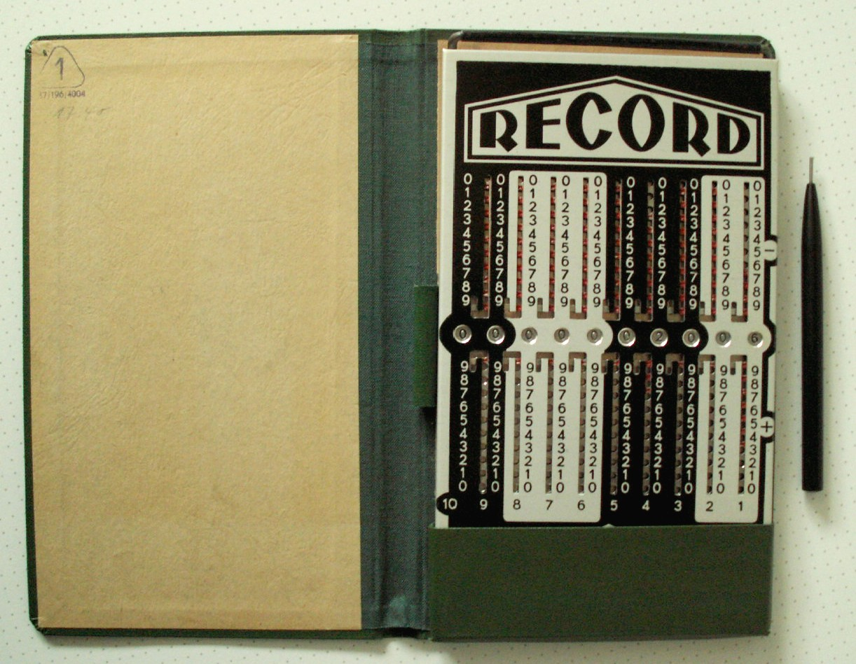 Rechenmaschine Record